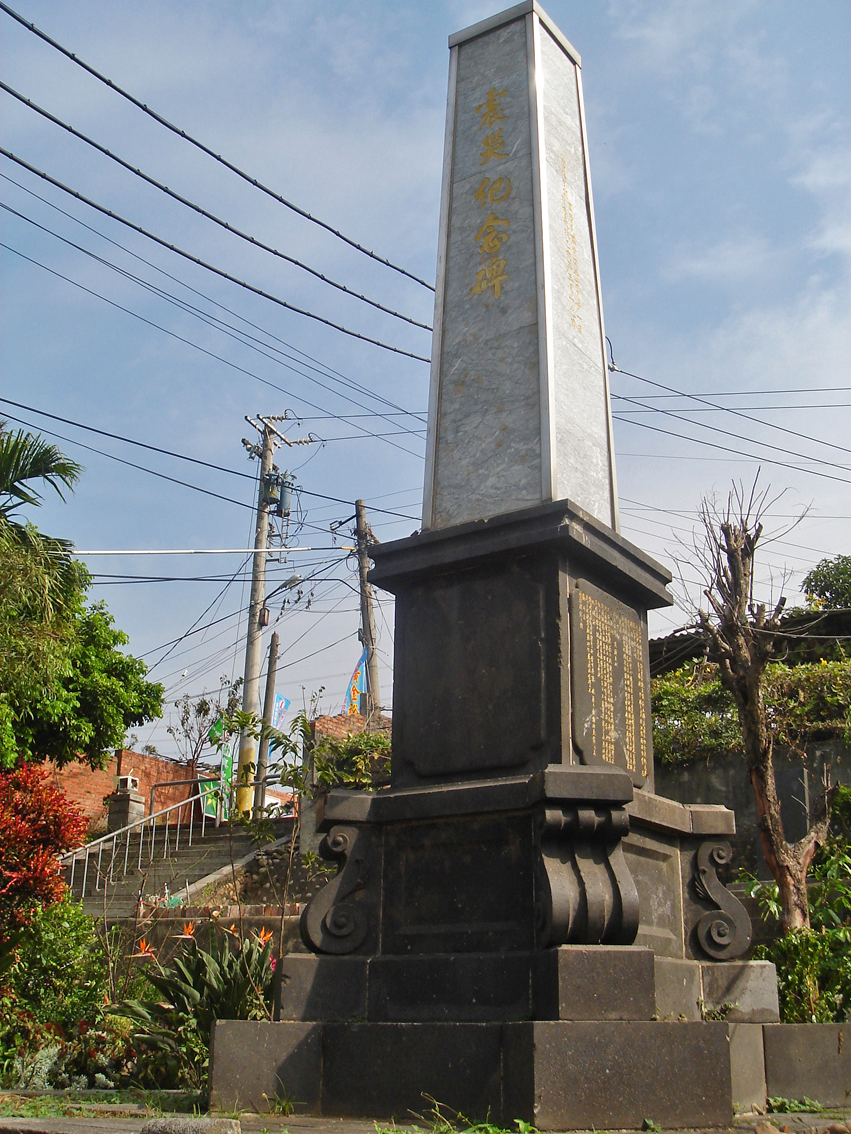 中文（台灣）: 台中清水街震災紀念碑。Bân-lâm-gú: Tâi-tiong Tshing-tsuí-ke tsùn-tsai kí-liām-pi